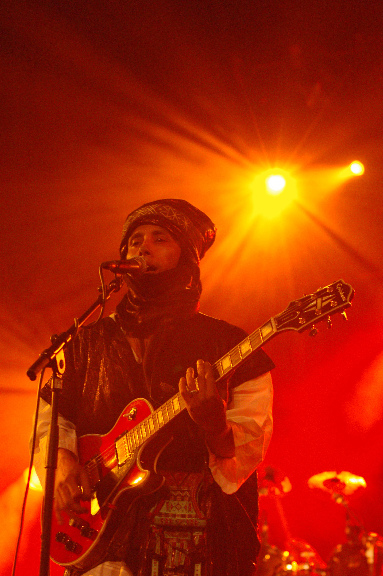 Moussa ag keyna, leader de Toumast